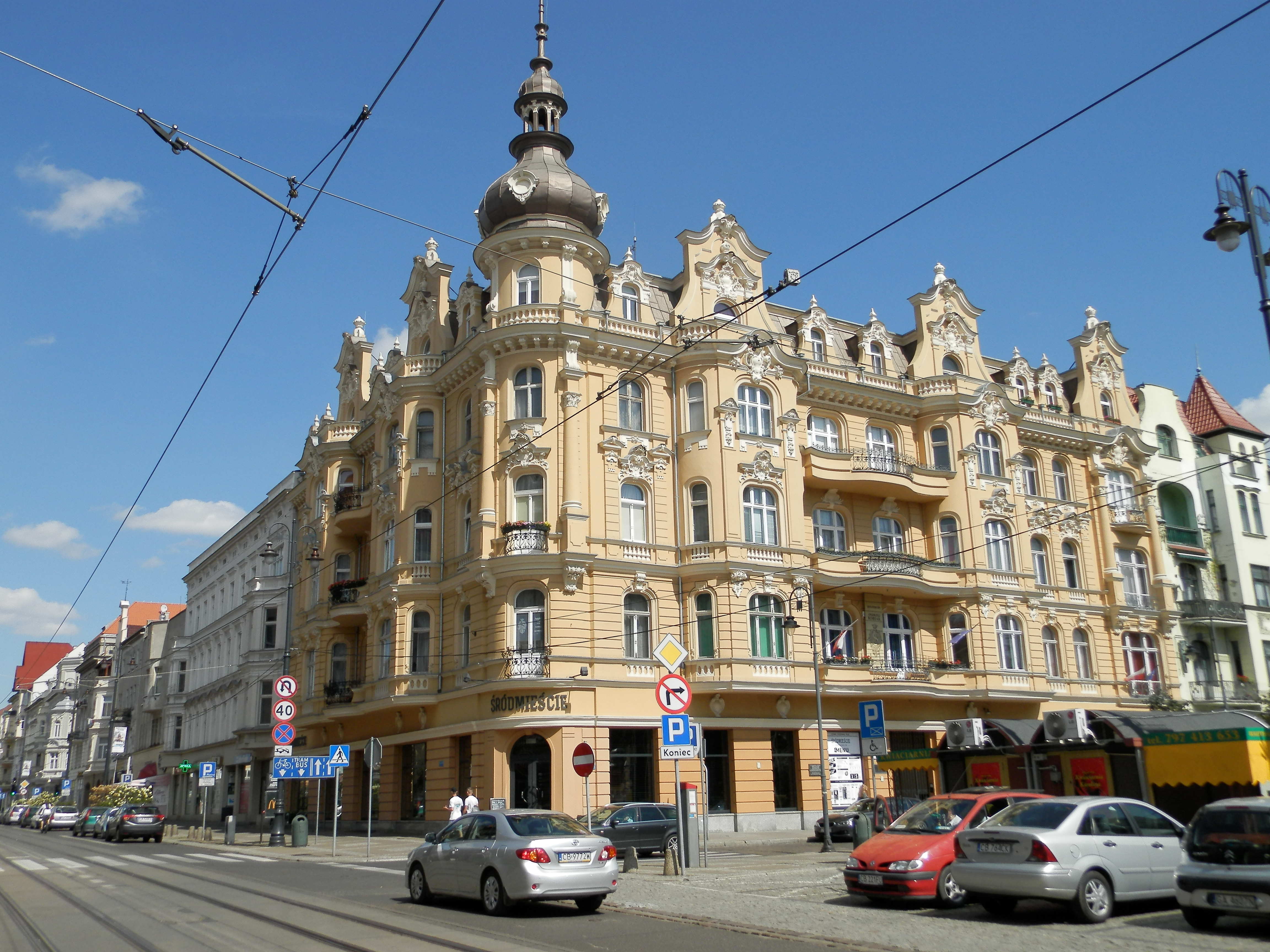 Bydgoszcz, Kamienica na placu Wolności 1 w Bydgoszczy Wikidata has entry Q11734219 with data related to this item.